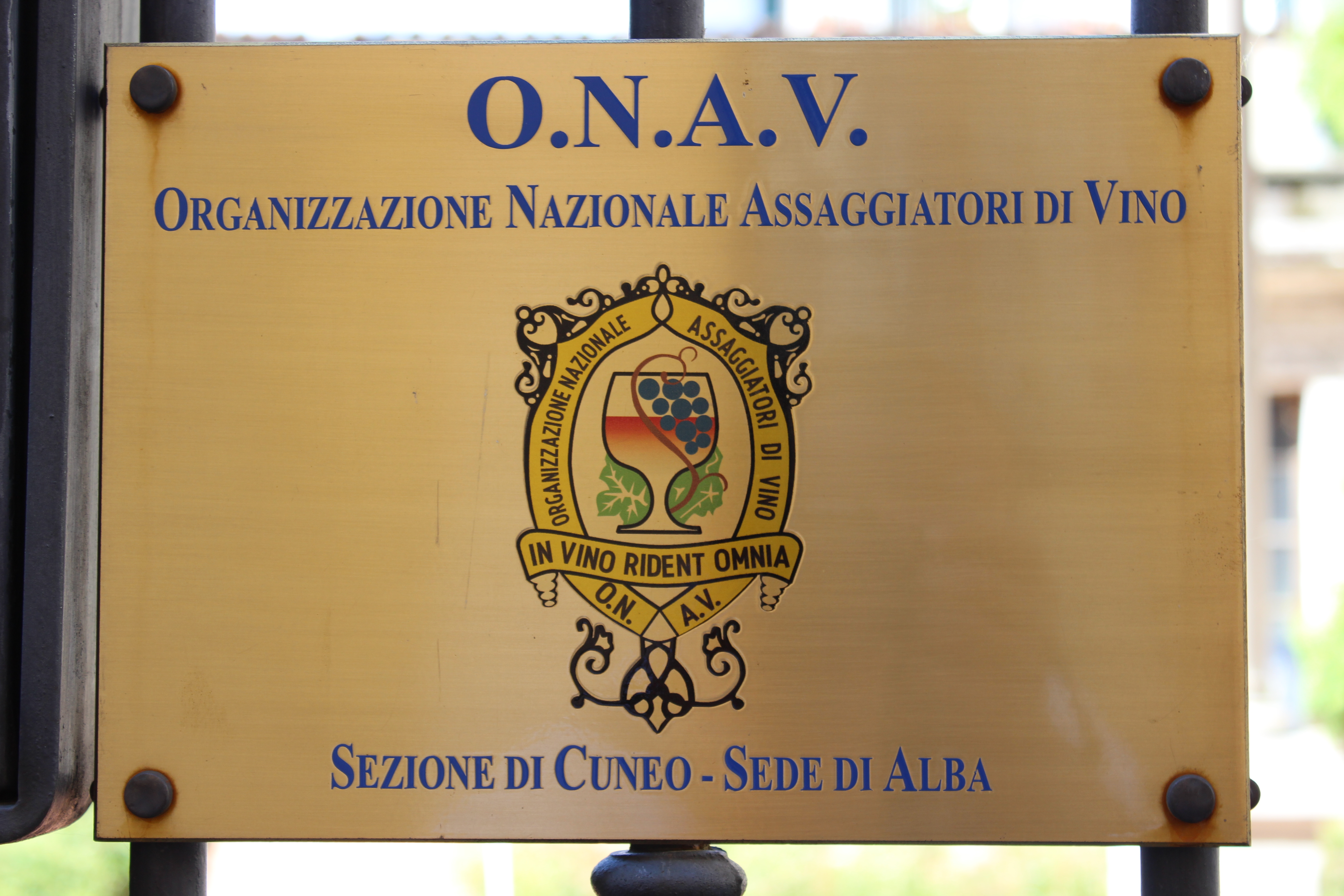 Organisation Nationale des Goûteurs de Vin à Alba (Italie)